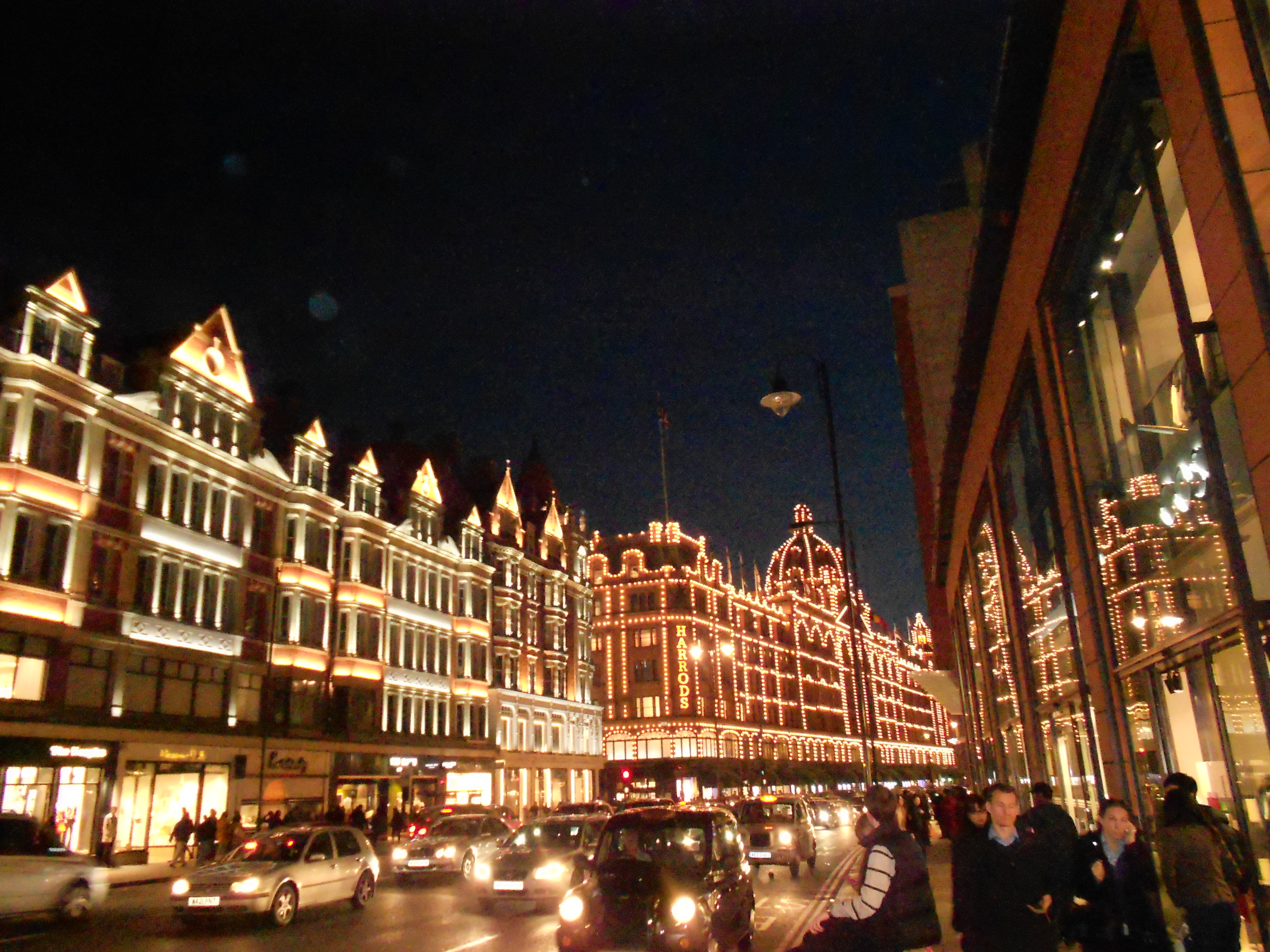 Die Brompton Road in der Abendämmerung